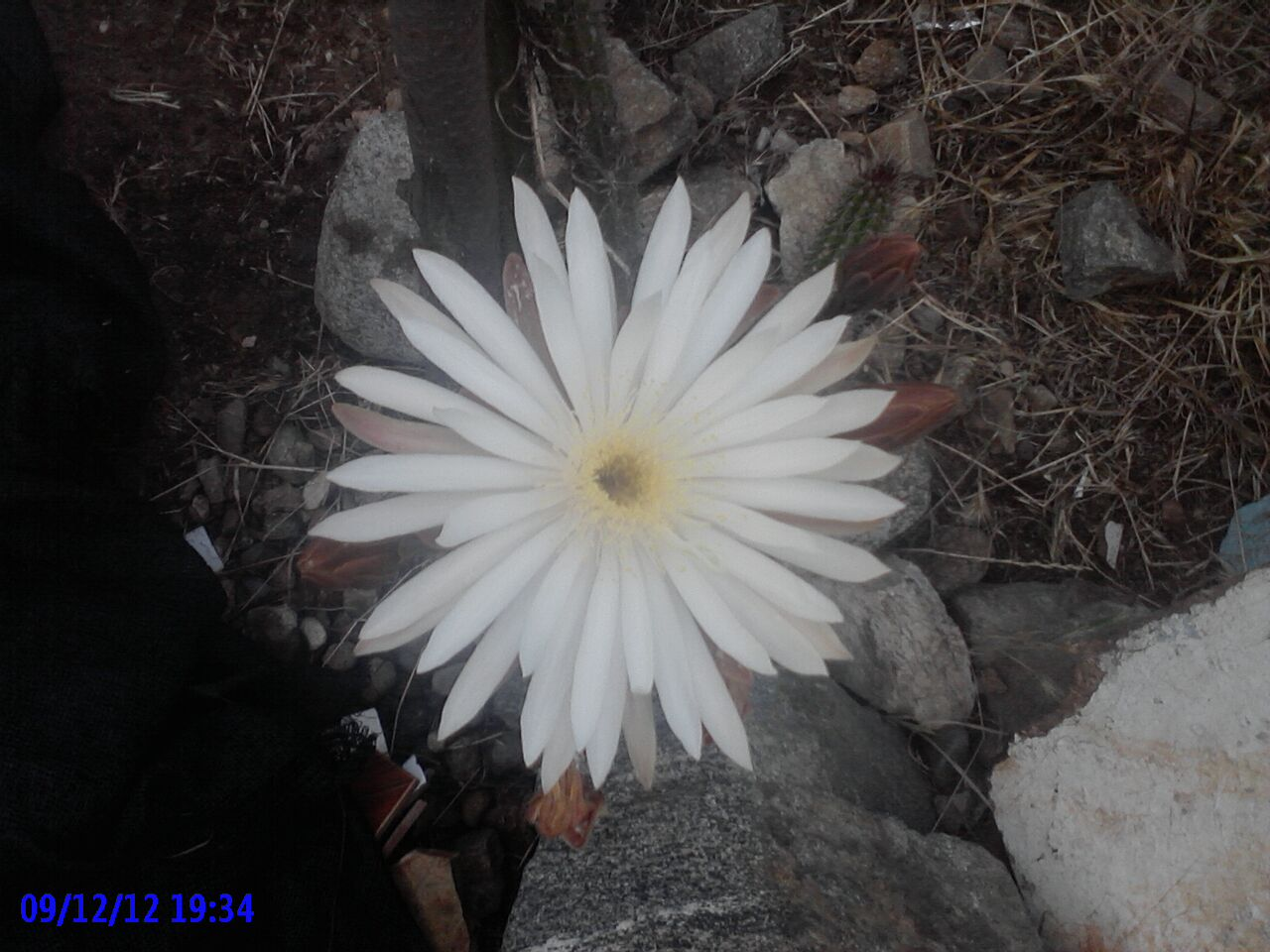 esta es una flor de cactus